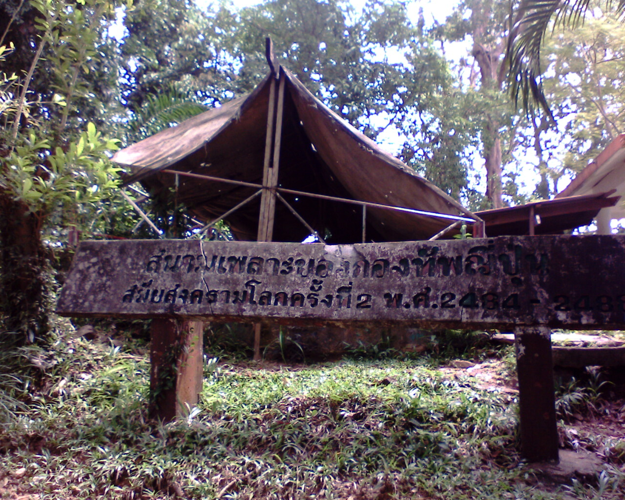 Old Japanese bunker during WW2 on Khuan Tamnak Chan, Kantang, Thailand